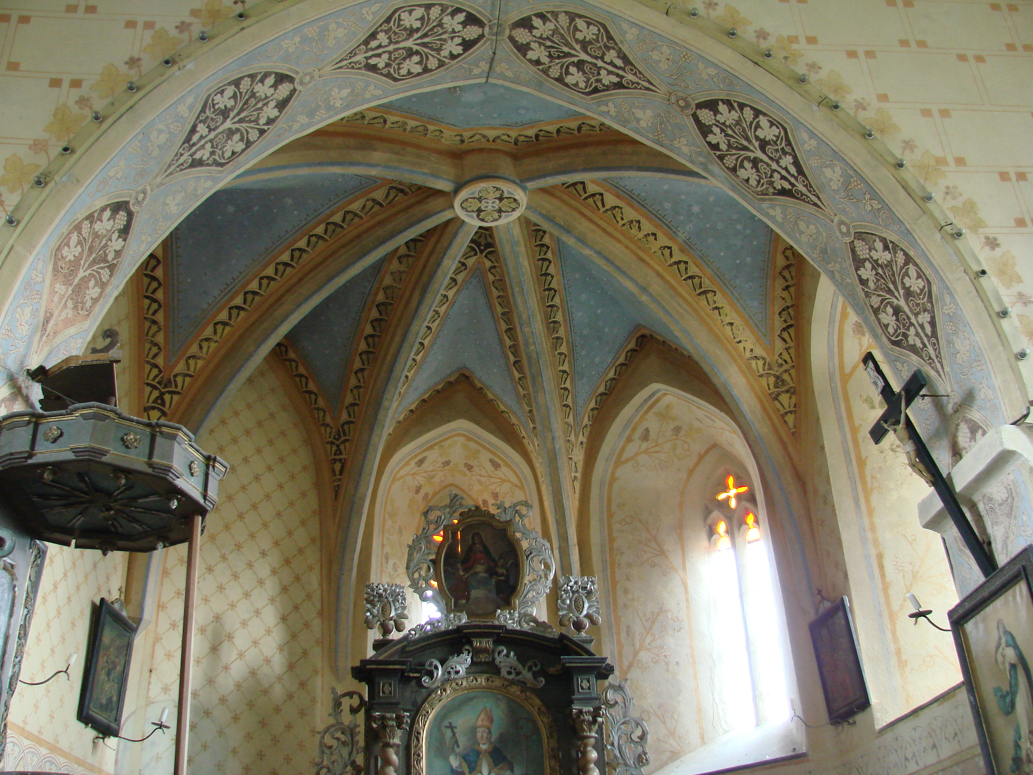 Kostel sv. Prokopa (Nadslav)